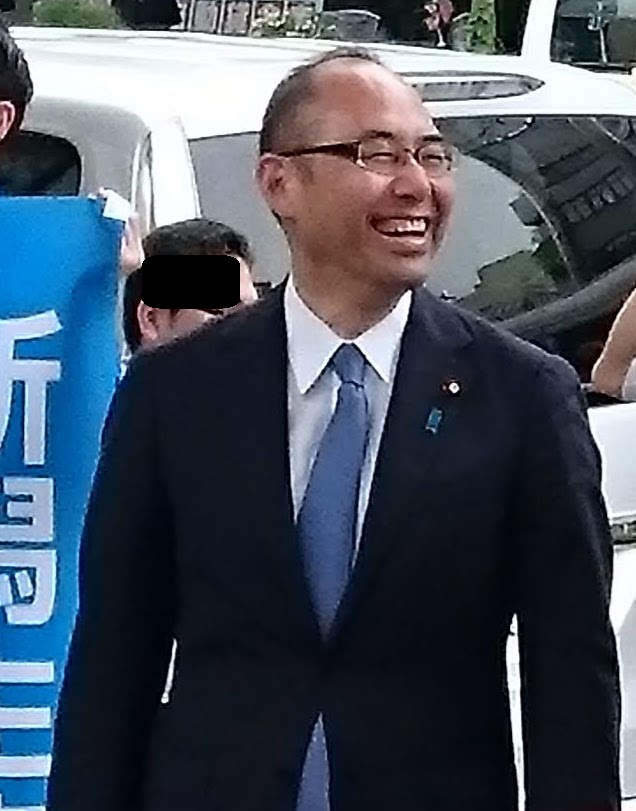 衆議院議員の細田 健一（新潟県 長岡市にて）